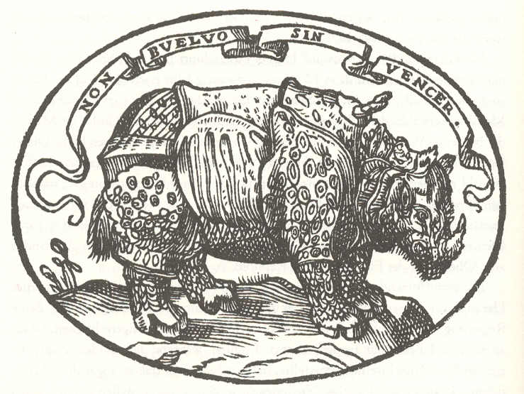 Emblem Alessandros de' Medici.